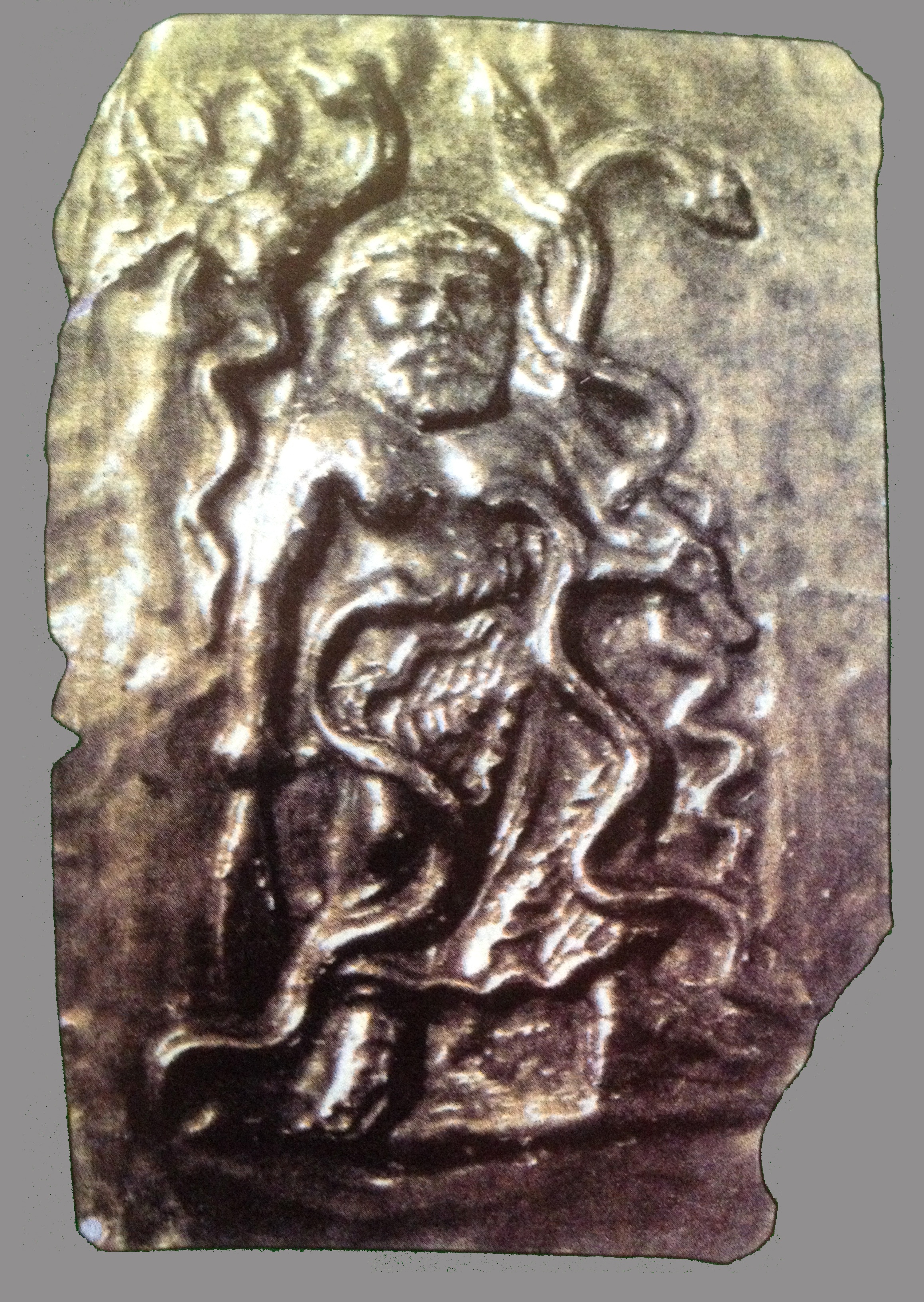 сребърна оброчна плочка с изображение на тракийски бог Сабазий